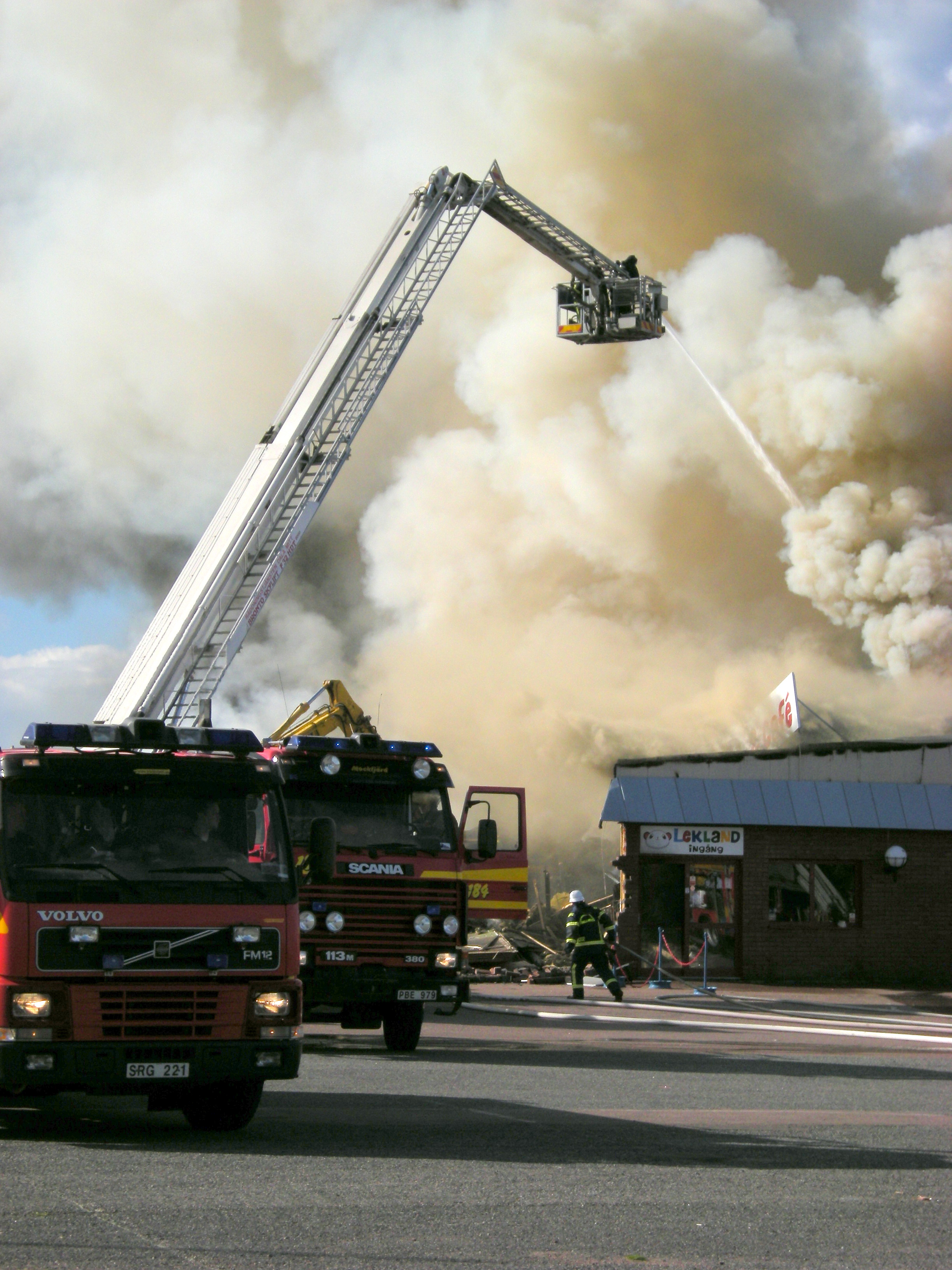 Brandbil, så kallad hävare, Borlänge, Dalarna